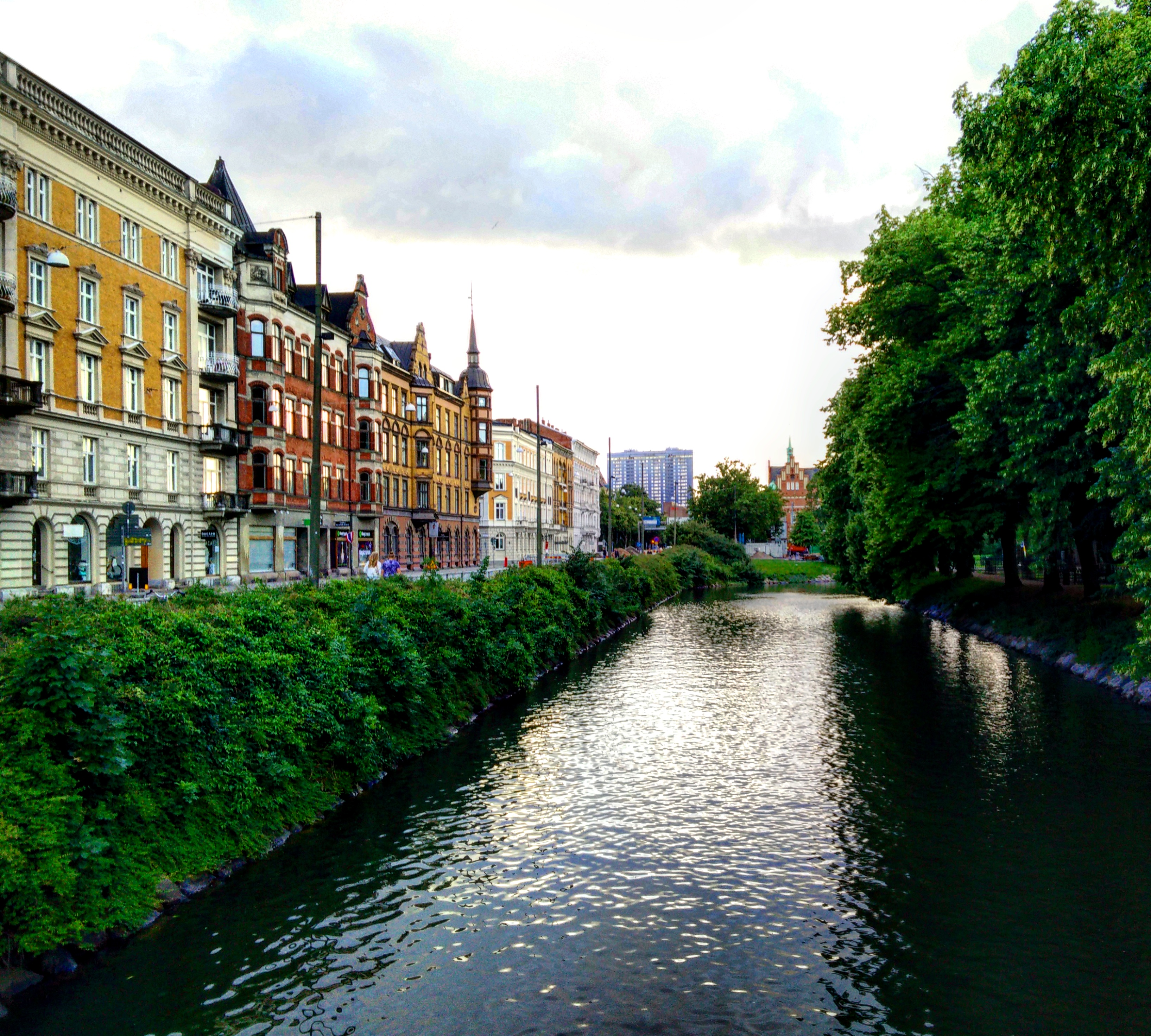 Vallgraven i Malmö.